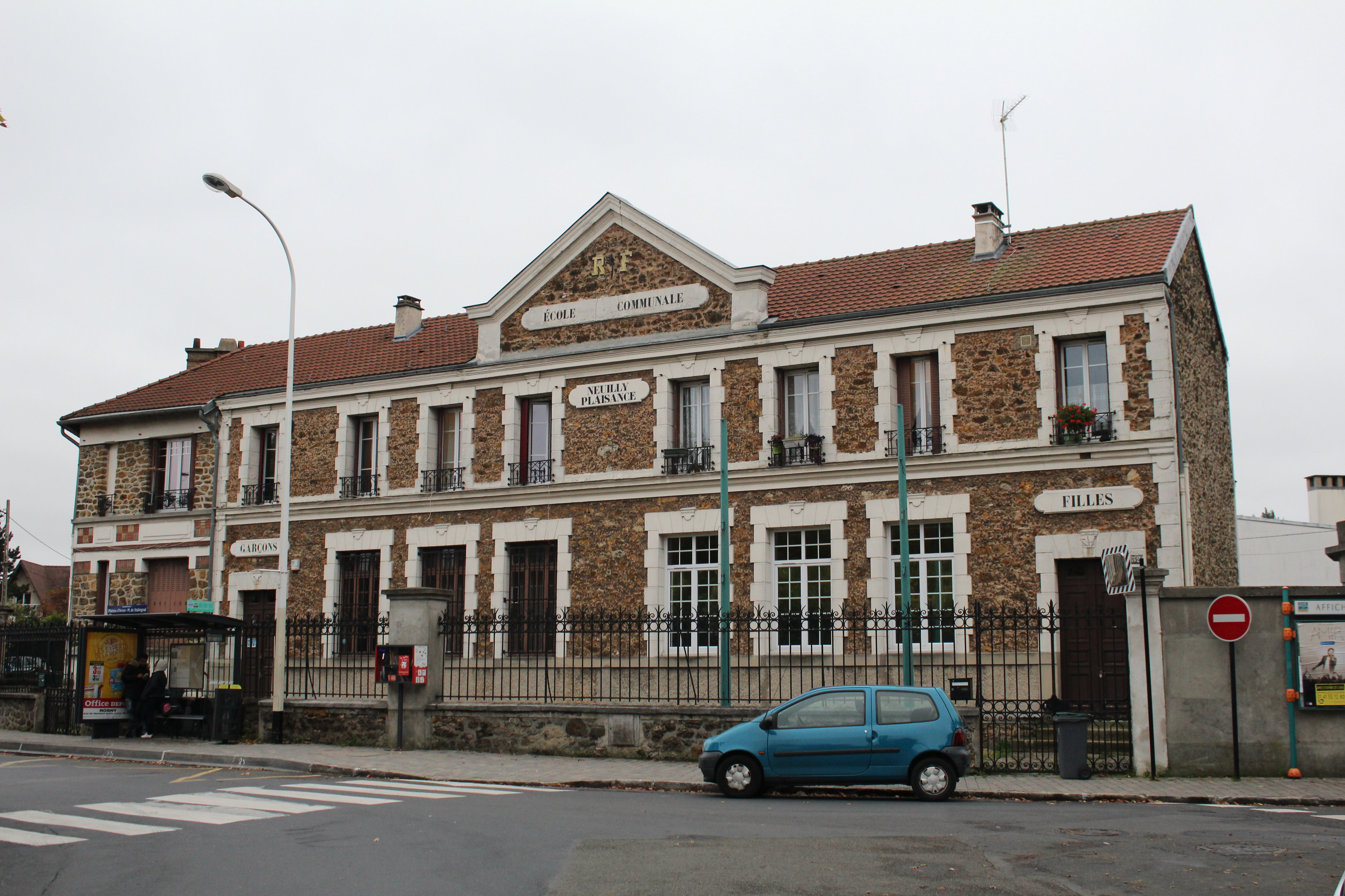 École Édouard-Herriot, Neuilly-Plaisance.